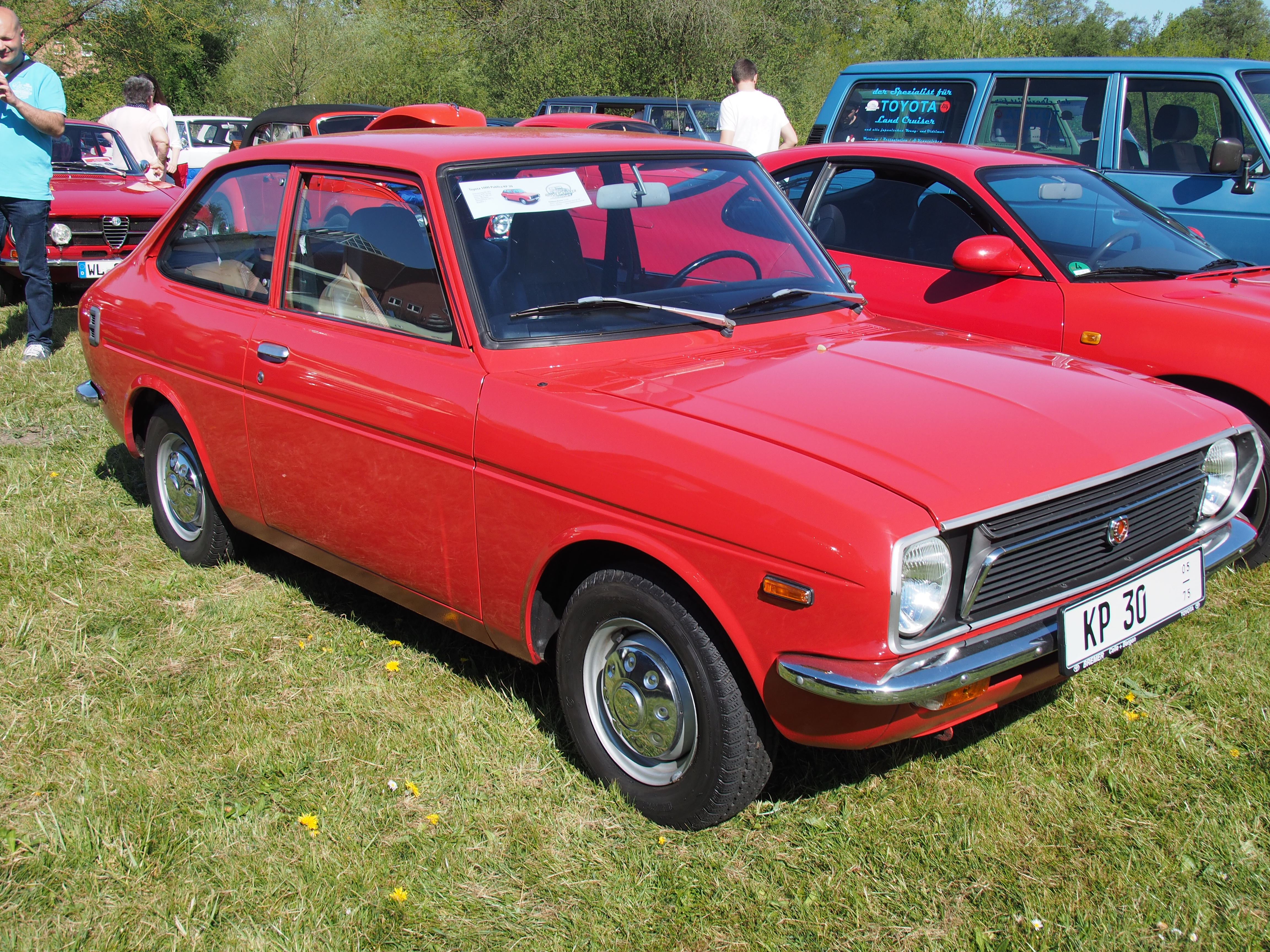 Toyota 1000 Publica KP 30, Erstzulassung Mai 1975, 35 KW/48 PS, 998 ccm, 4 Zylinder Reihe, Höchstgeschwindigkeit 135 km/h.